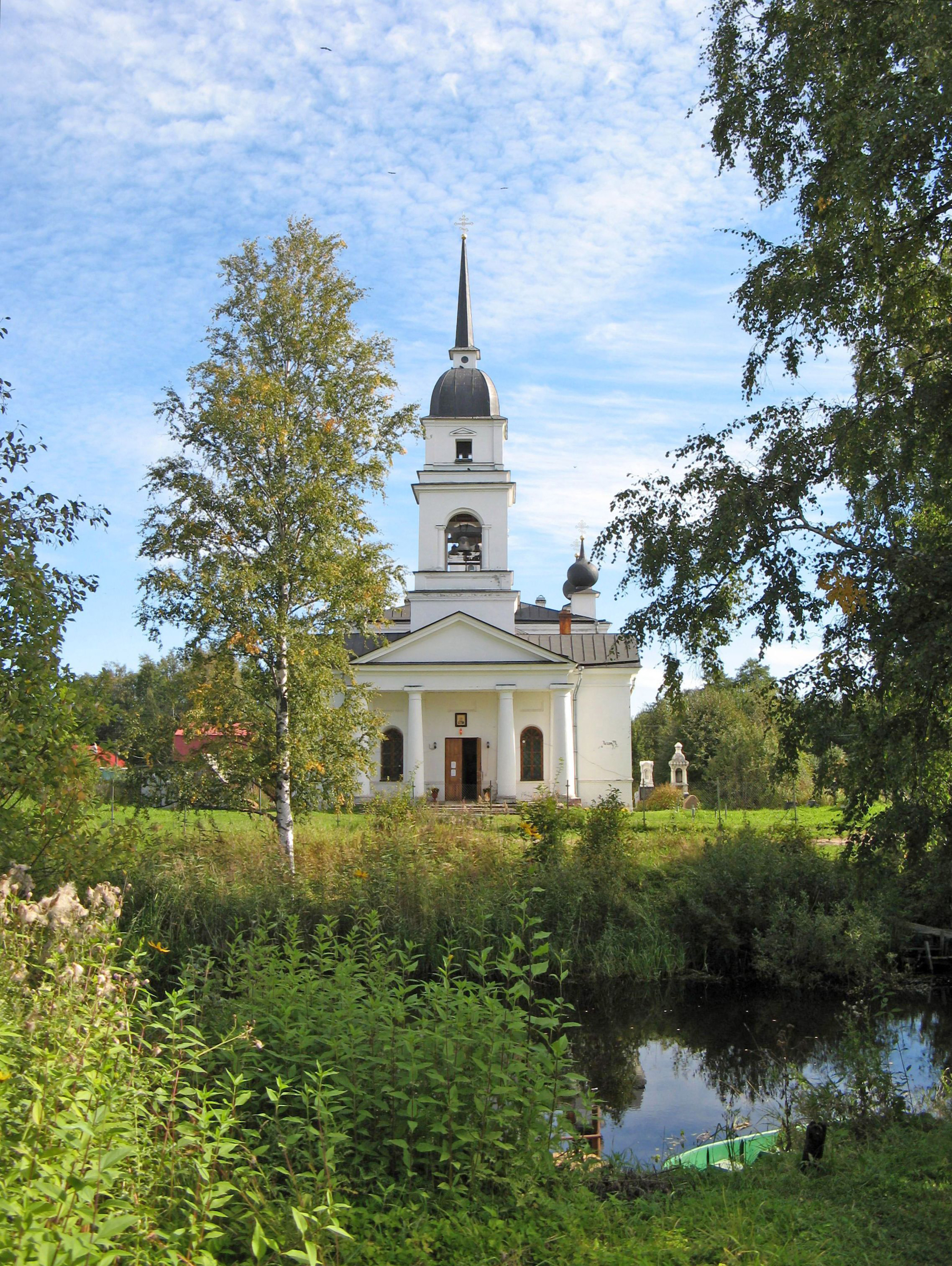 Никольская церковь (храм святителя Николая Чудотворца): Староладожский канал, 1 линия, 1Б, Кобона, Кировский район, Ленинградская область